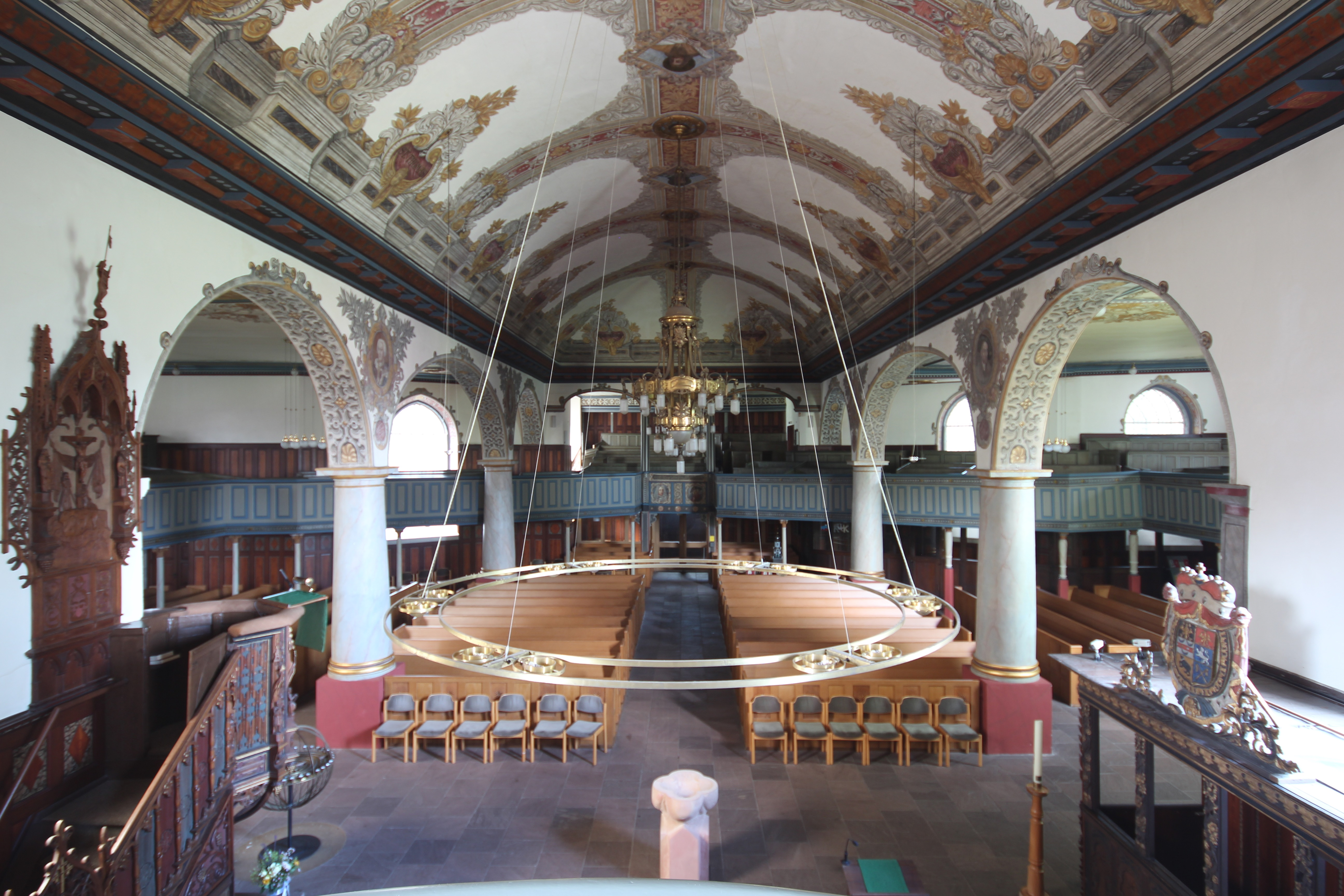 Lutherkirche zu Leer (Ostfriesland), Blick von der Orgelempore in das Kirchenschiff